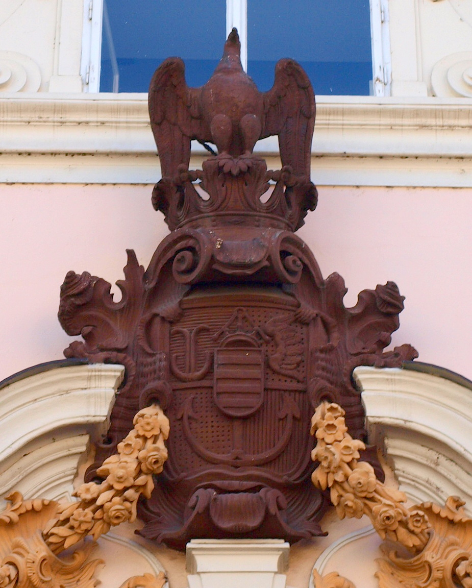 Palác Sylva-Taroucca. Znak majitele z rodu Nostic.